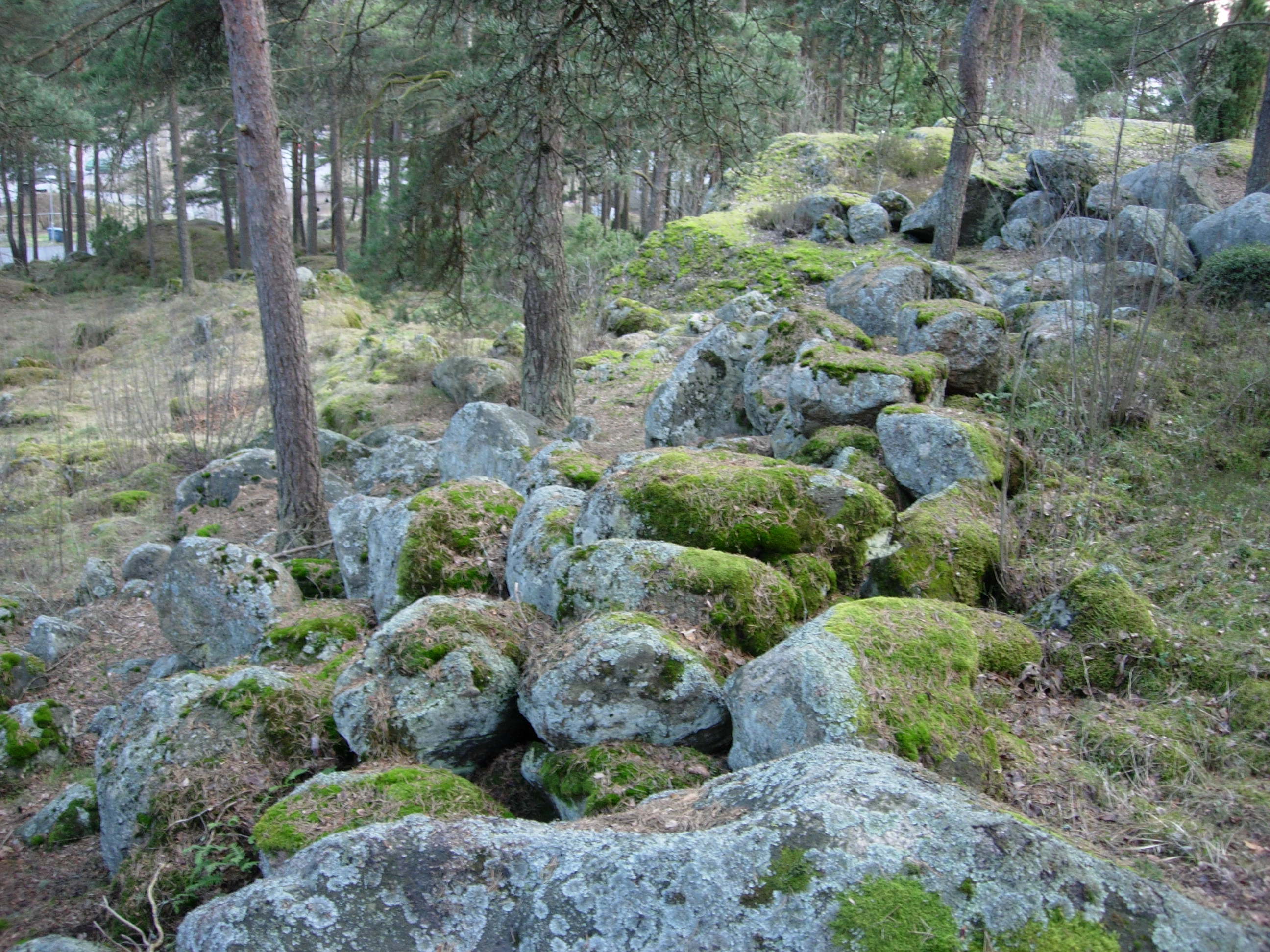 Linnasmäki, linnavuori Räntämäessä, Turussa.